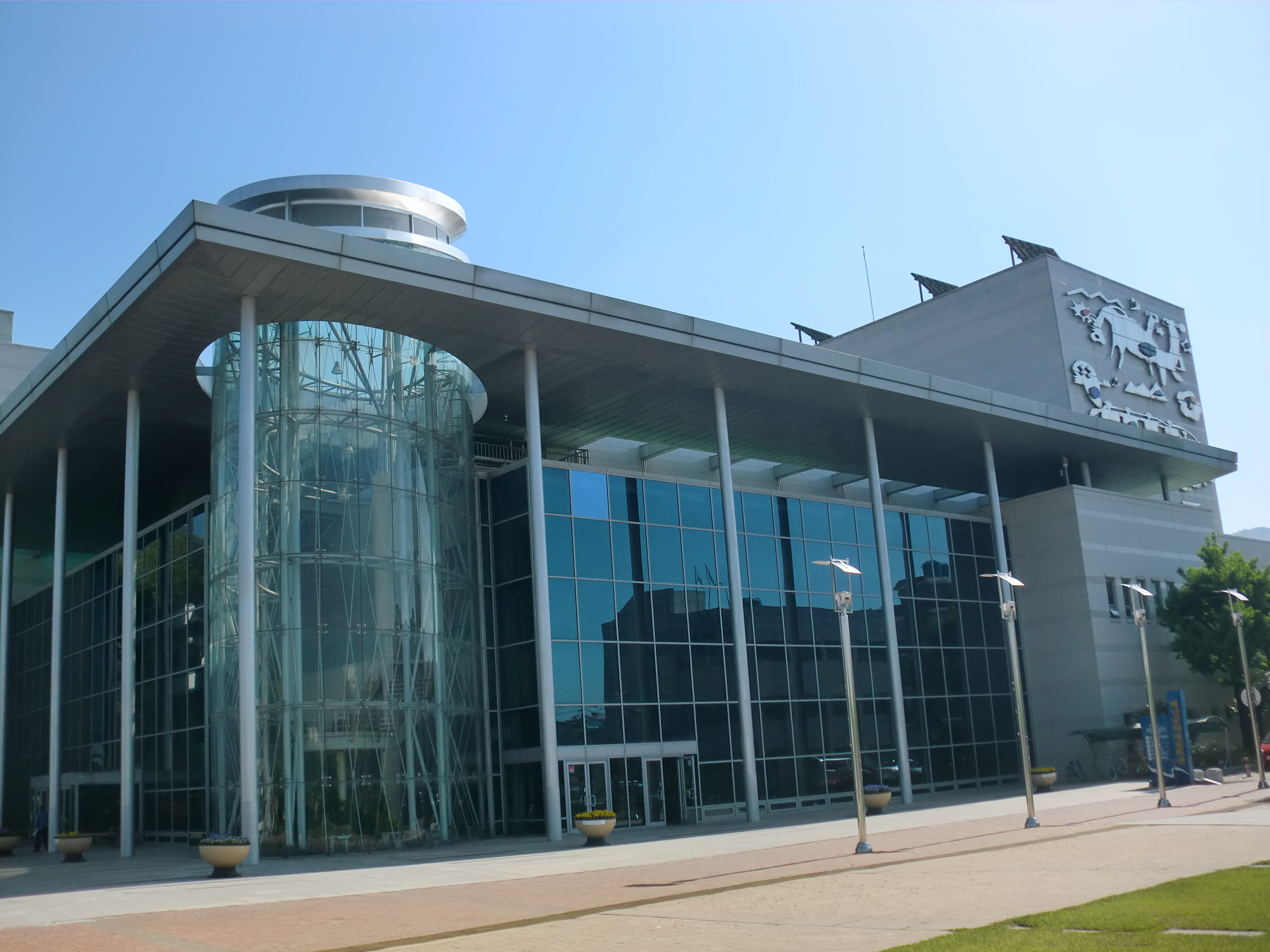 전라남도 해남군에 있는 해남군립도서관 및 해남문화예술회관